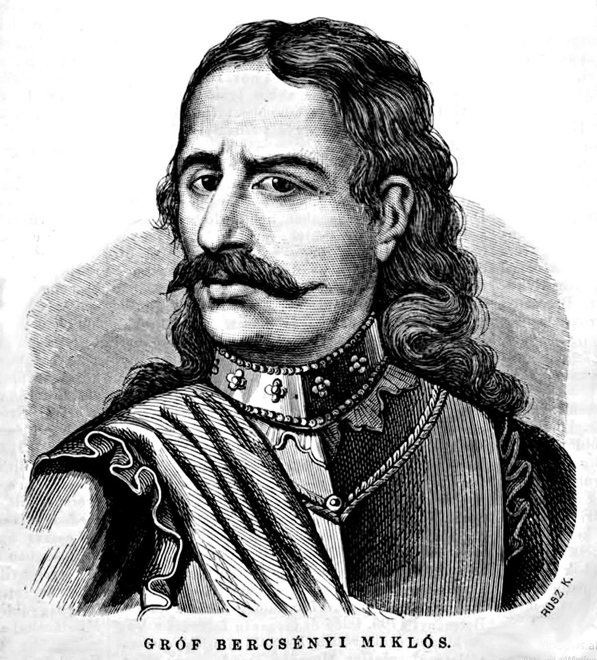 Bercsényi Miklós (1665–1726) kuruc hadvezér. Rusz Károly metszete (Vasárnapi Ujság, 1867. december 22.)